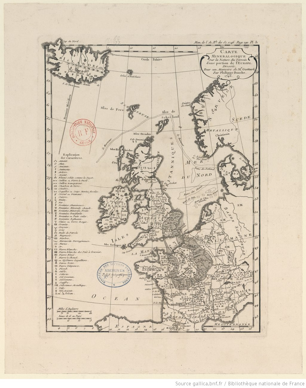 Carte minéralogique sur la nature du terrain d’une portion de l’Europe de Jean-Étienne Guettard, éditée en 1746